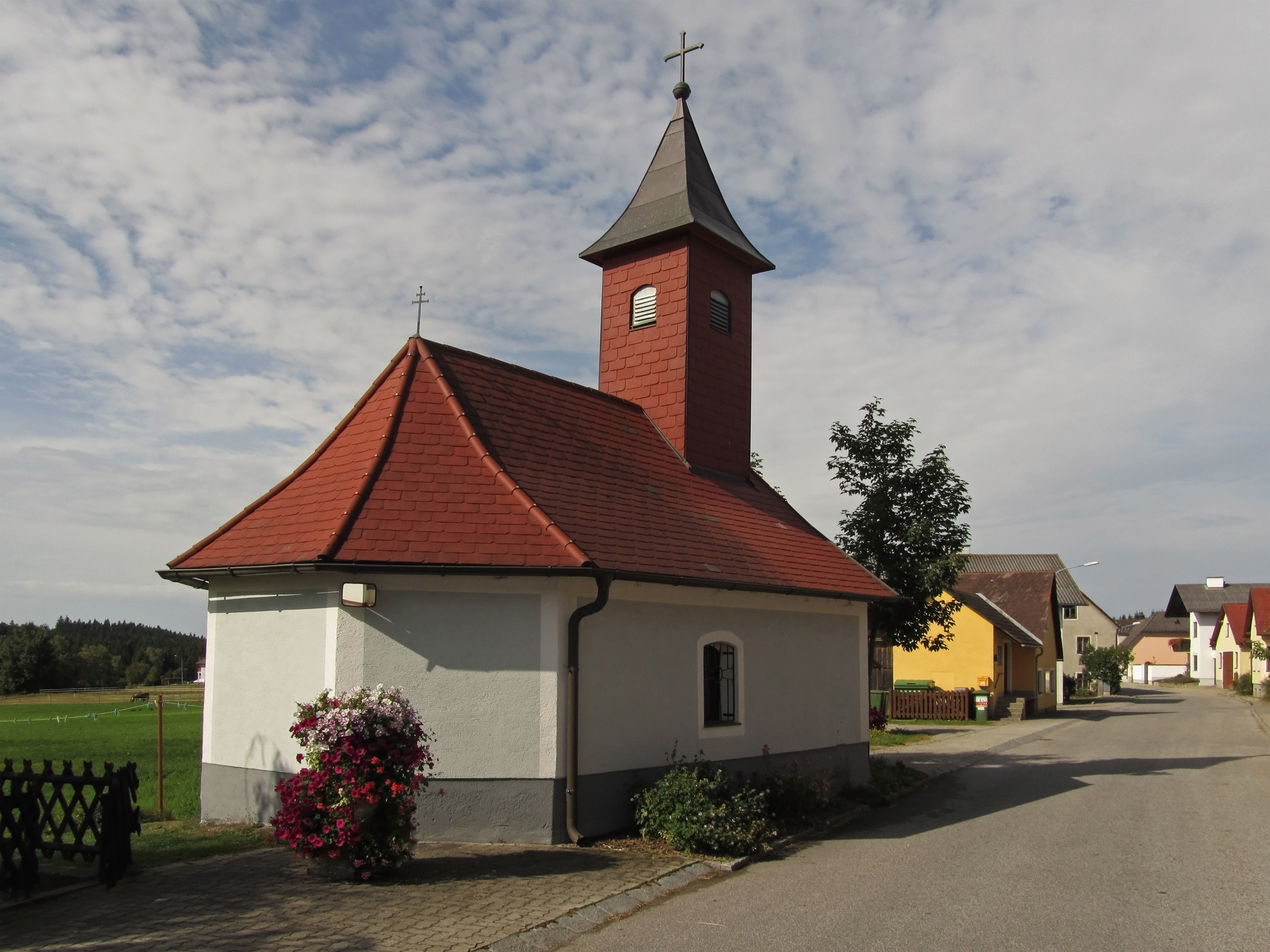 Schlichte Kapelle mit dreiseitigem Schluss und Dachreiter. Spätgotische Figur des hl. Nikolaus um 1510. Tabernakel aus der ersten Hälfte des 18. Jahrhunderts.